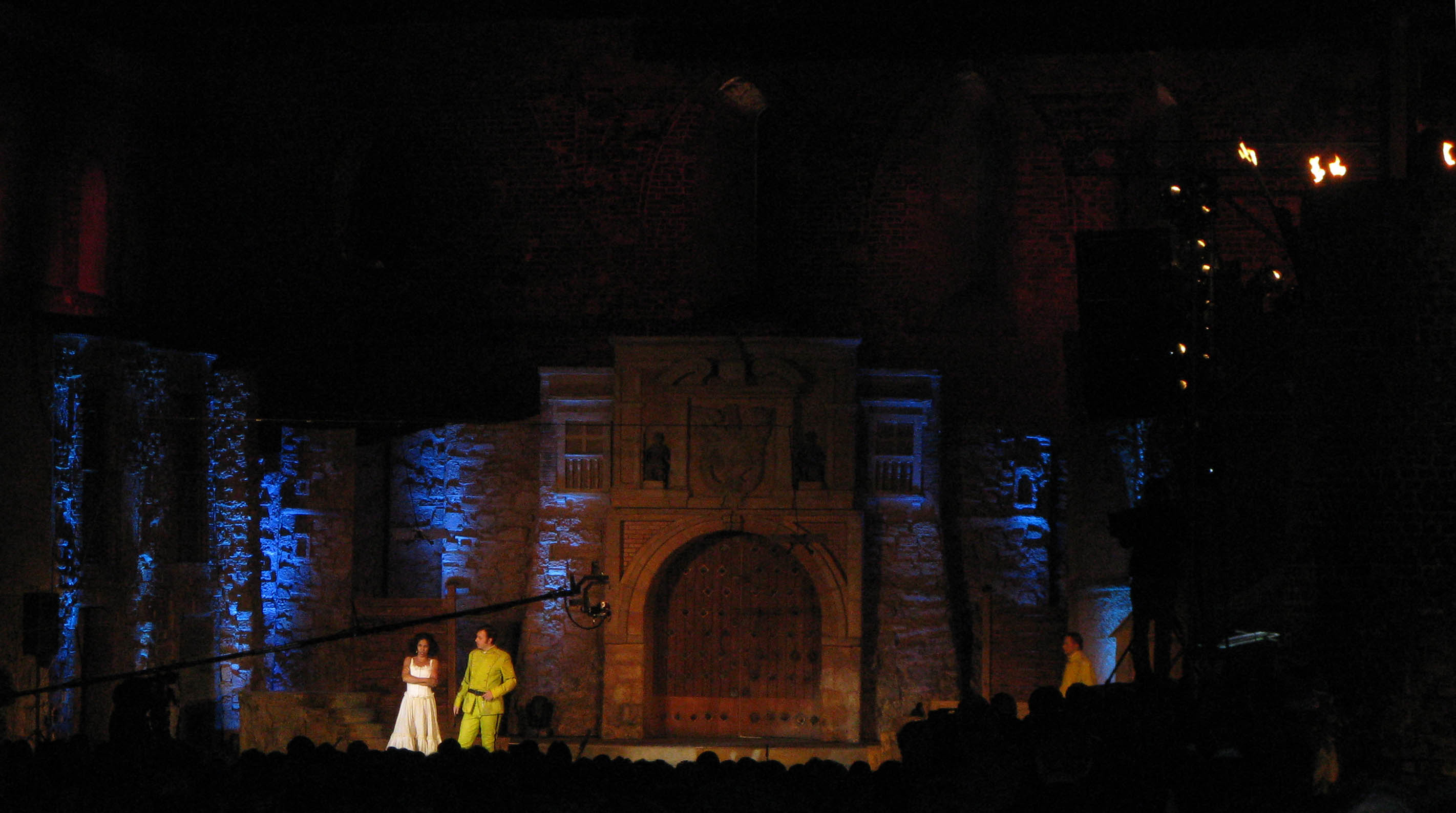 Carmen w wykonaniu Opery Nova - spektakl plenerowy w Fosie Zamkowej w Toruniu